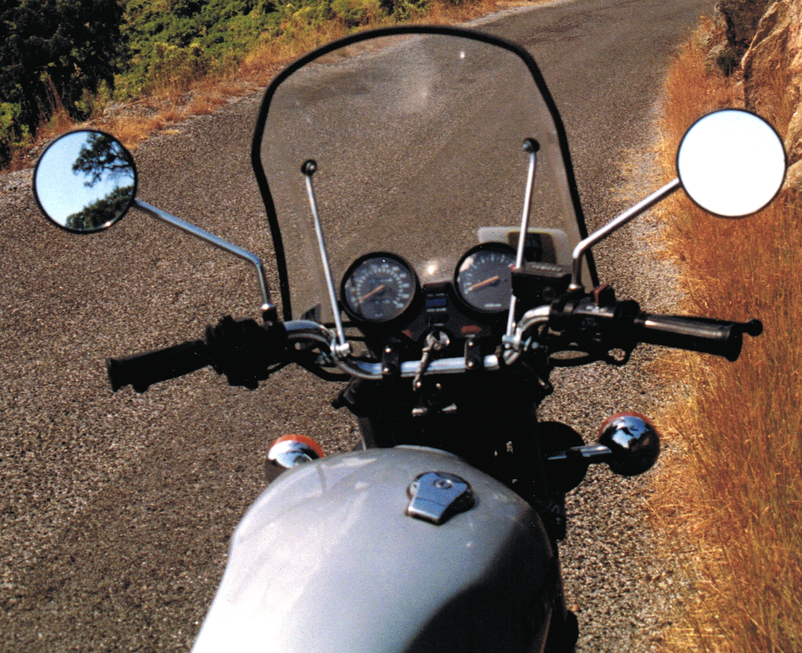 Yamaha TR 1, Bj. 1981